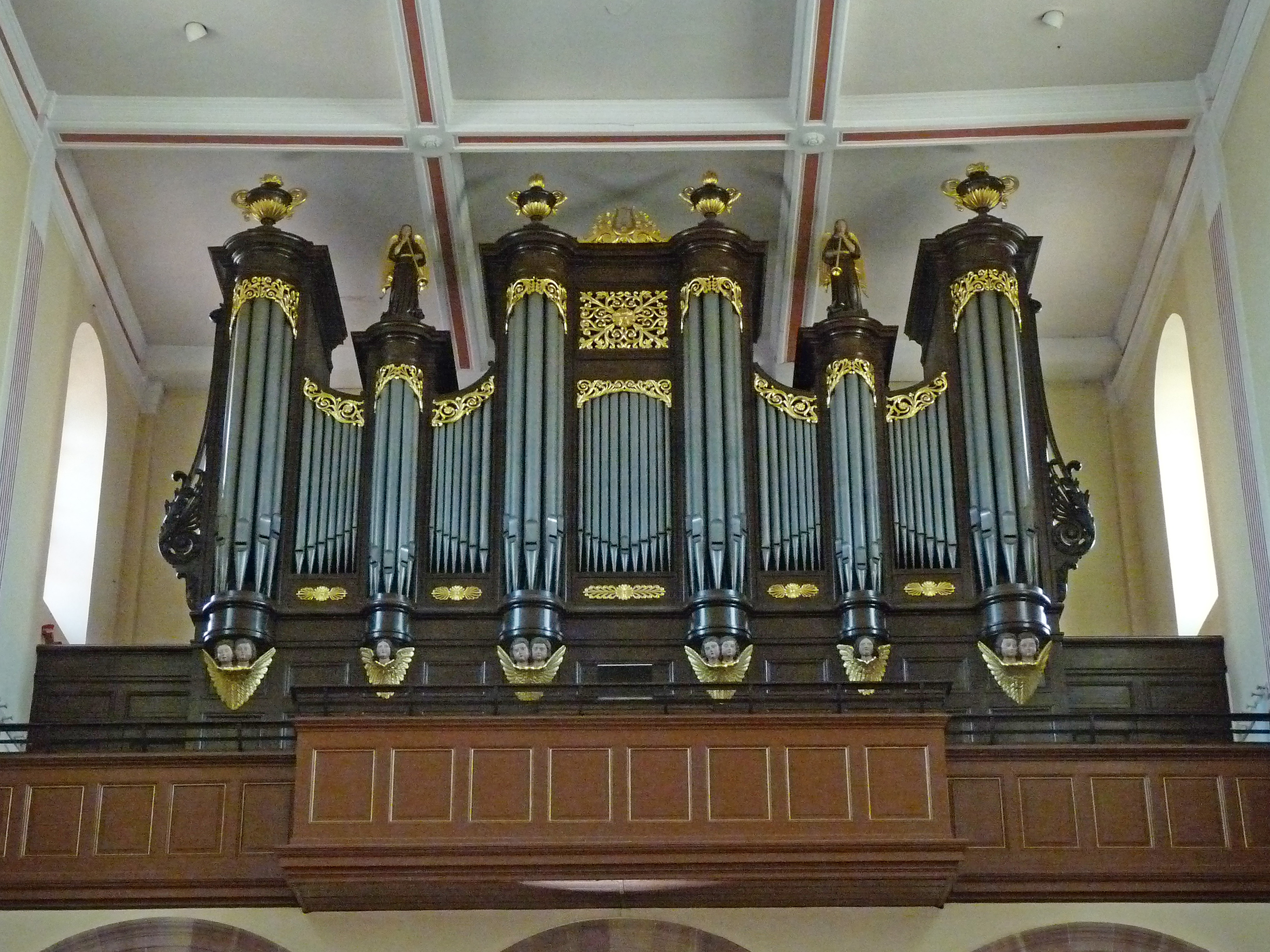 Dannemarie (Haut-Rhin) : orgue Callinet (1846) à l'église Saint-Léonard. Buffet classé Monument Historique en 1988.